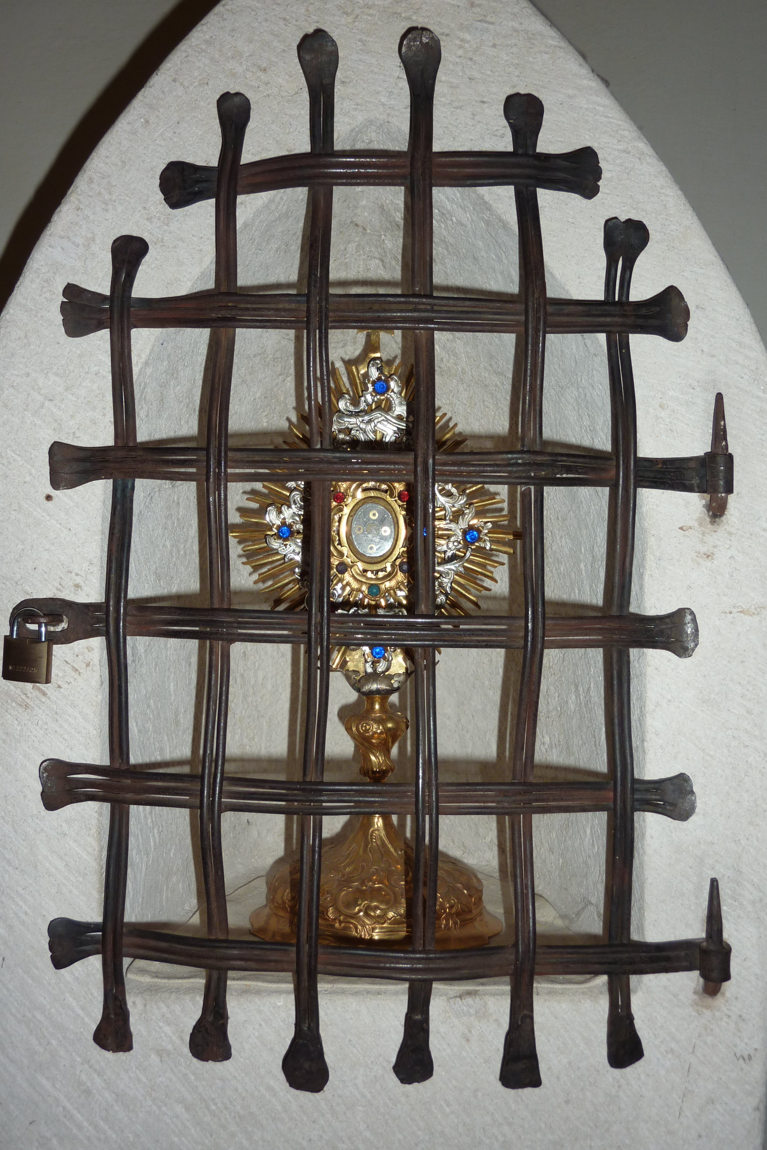 Pfarrkirche St. Kastor Weiler (bei Mayen) in Weiler (bei Mayen), Reliquie des hl. Kastor